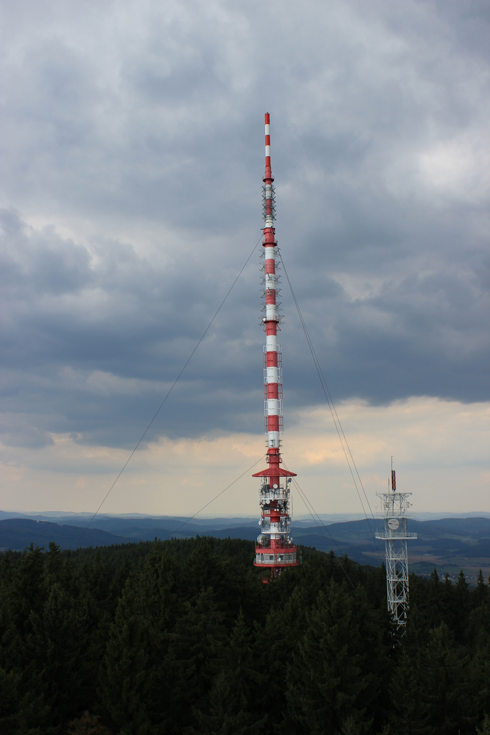 Sendemast auf dem Berg Kleť in Südböhmen.Hornjoserbsce: Wusyłanski sćežor na horje Kleť w Južnych Čechach.